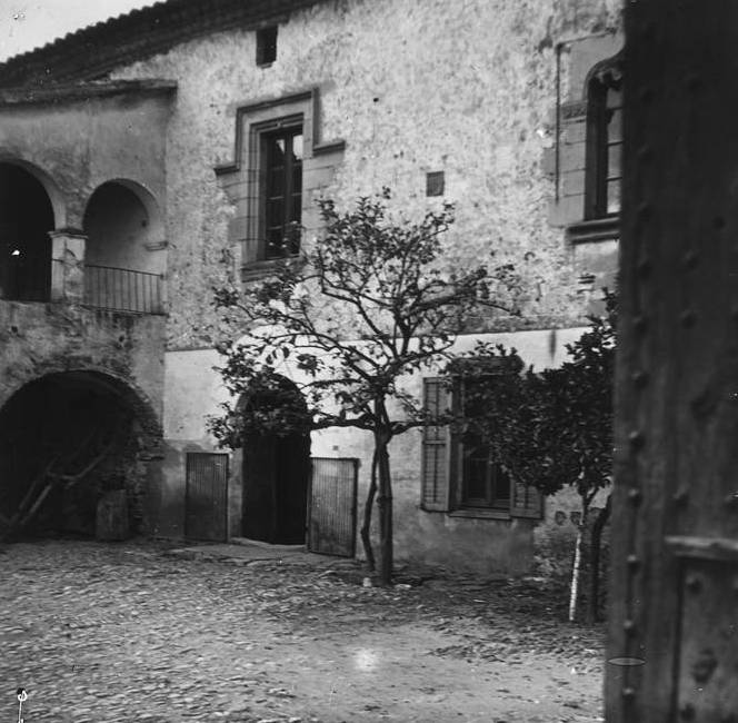 Façana de Can Draper a l ' Ametlla del Vallès. Josep Salvany i Blanch (1926)